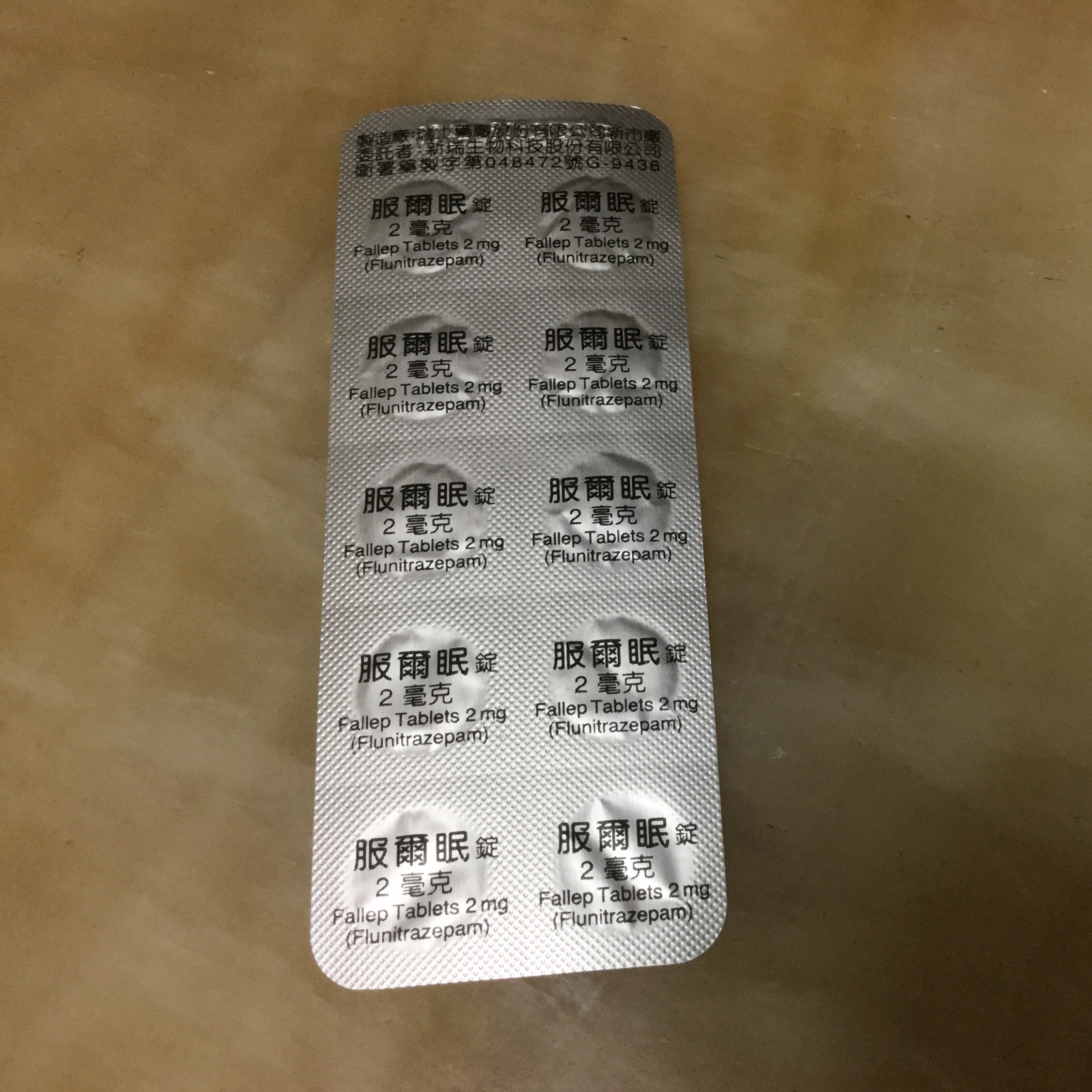 服爾眠背面包裝